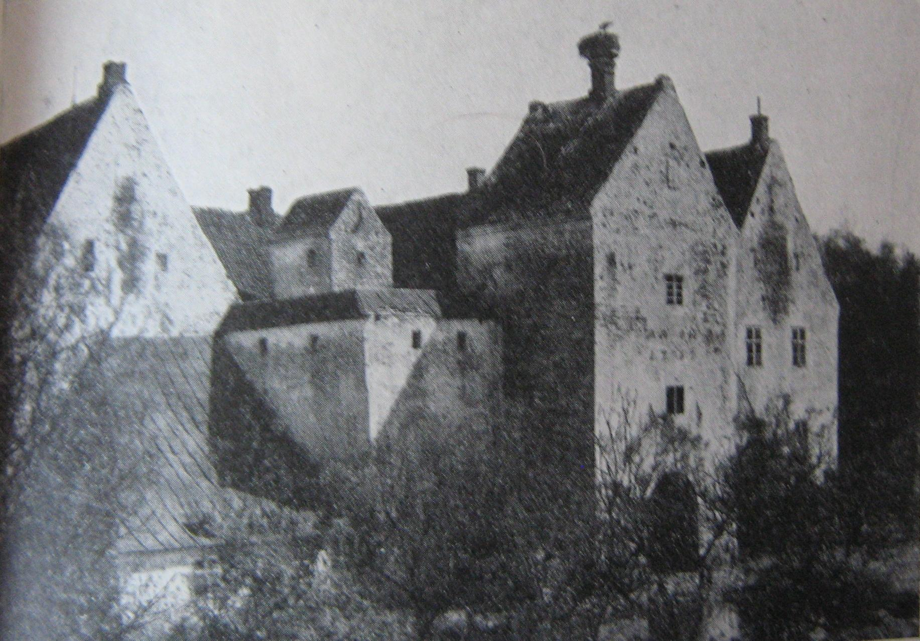 Spöttrups slott, före 1921 och renoveringen på 1930-talet. Den modernare tillbygnaden finns ännu kvar och slottet är vitputsat.